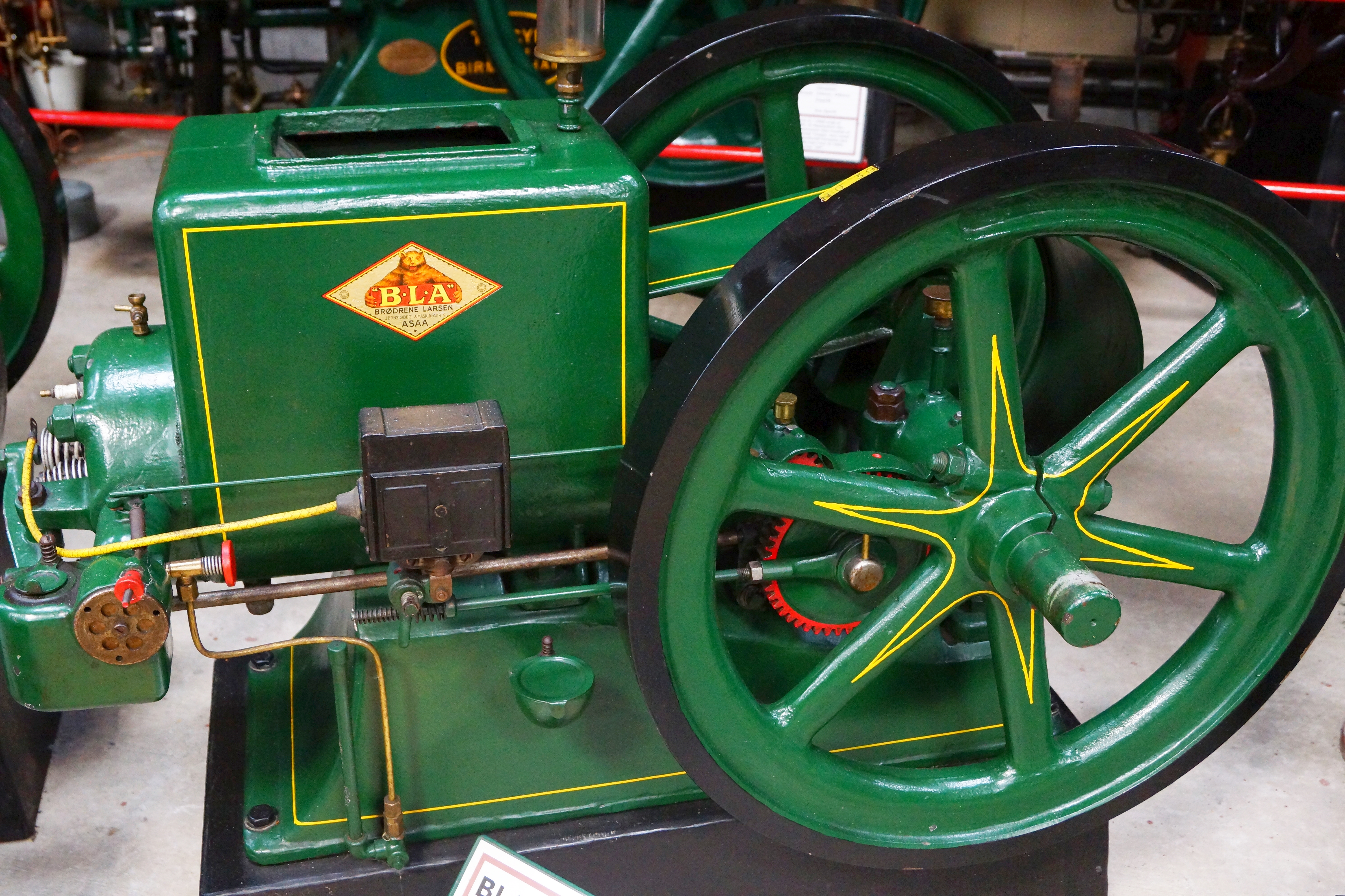 B.L.A.-motor